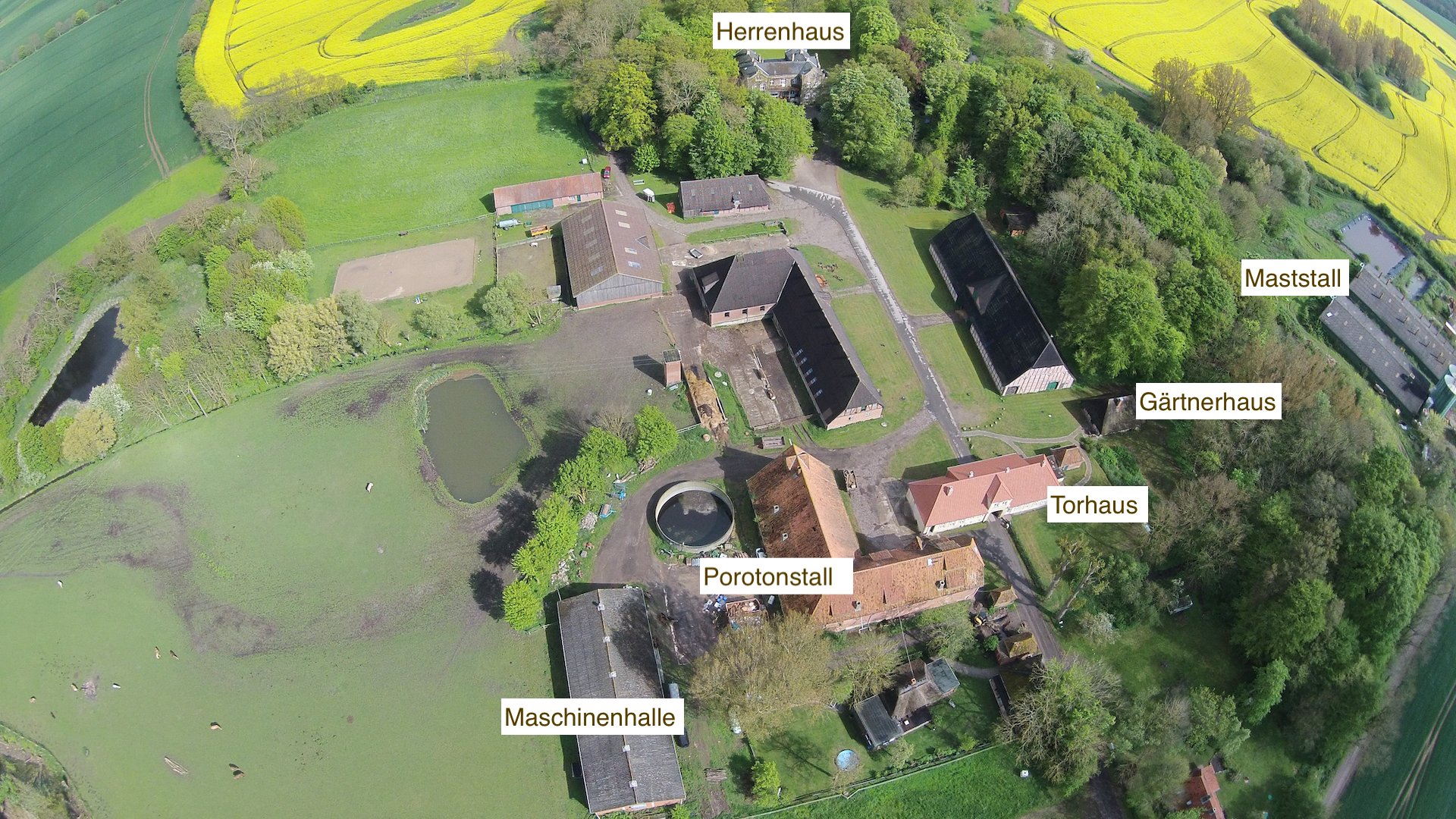 Hofplan Gut Godderstorf 2018